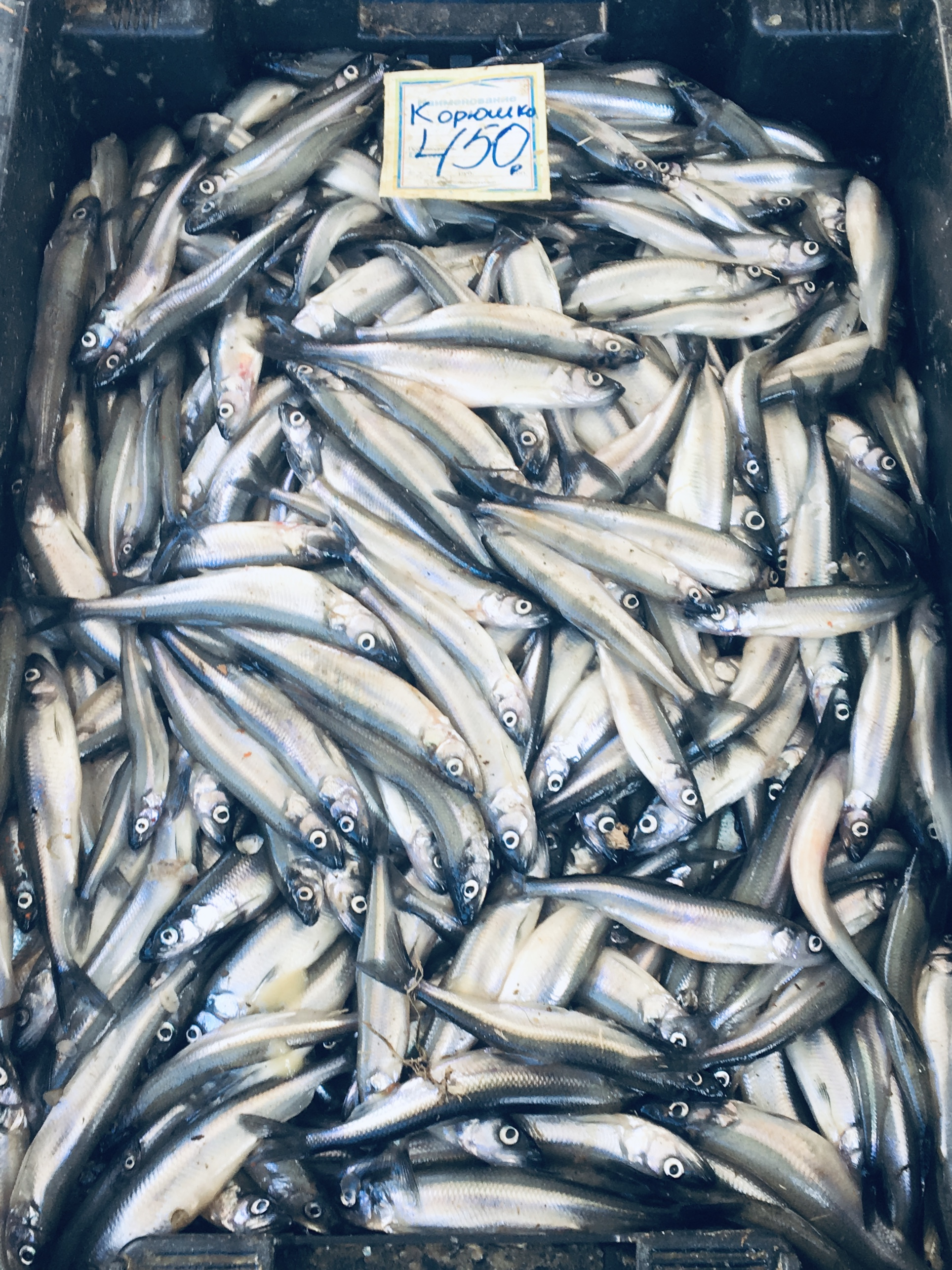 Корюшка - рыба, которая объединяет жителей Санкт-Петербурга на основе уже давно существующих традиций. Корюшке посвящают фестивали и выставки и раз в год (весна) устраивают в её честь большой праздник. This image has been uploaded for Wikivoyage travel guide on Санкт-Петербург